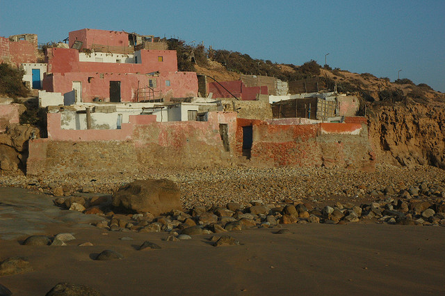 Architecture berbère